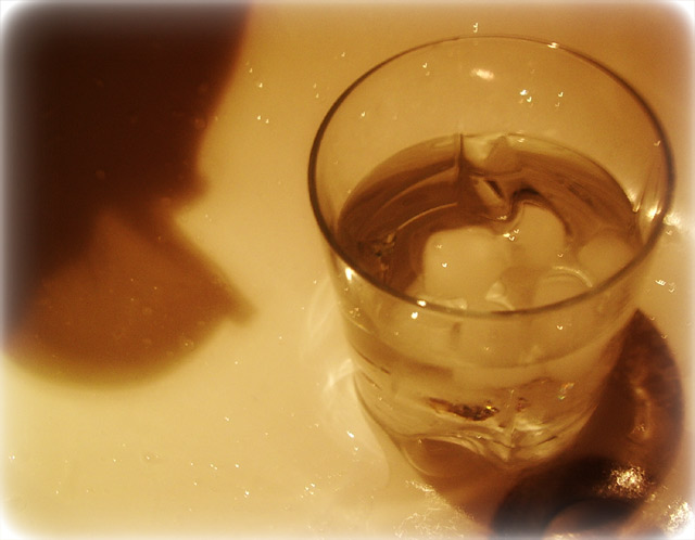 Тени и полутени от прозрачных предметов